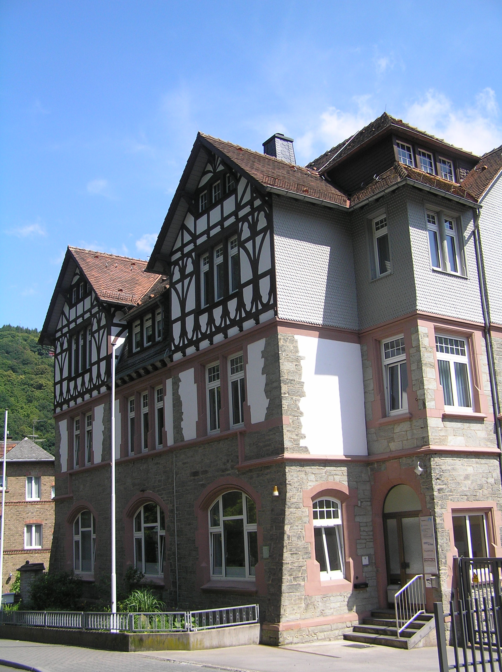 Altbau der Stanniolfabrik in Eppstein. Das Kontorgebäude wurde 1904 vom Architekten Carl Wilhelm Plöcker erbaut.